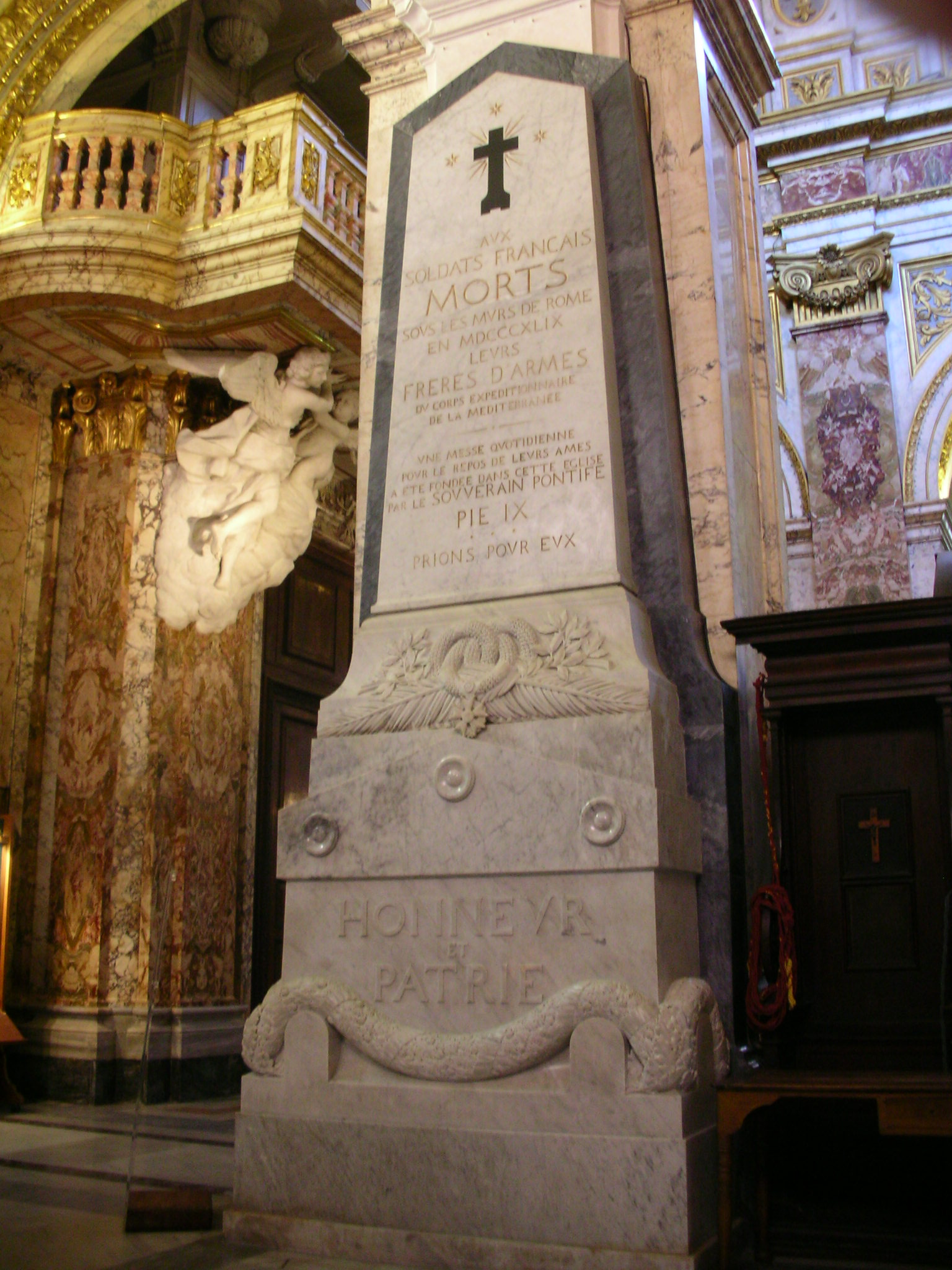 War memorial to French soldiers, San Luigi dei Francesi, Rome